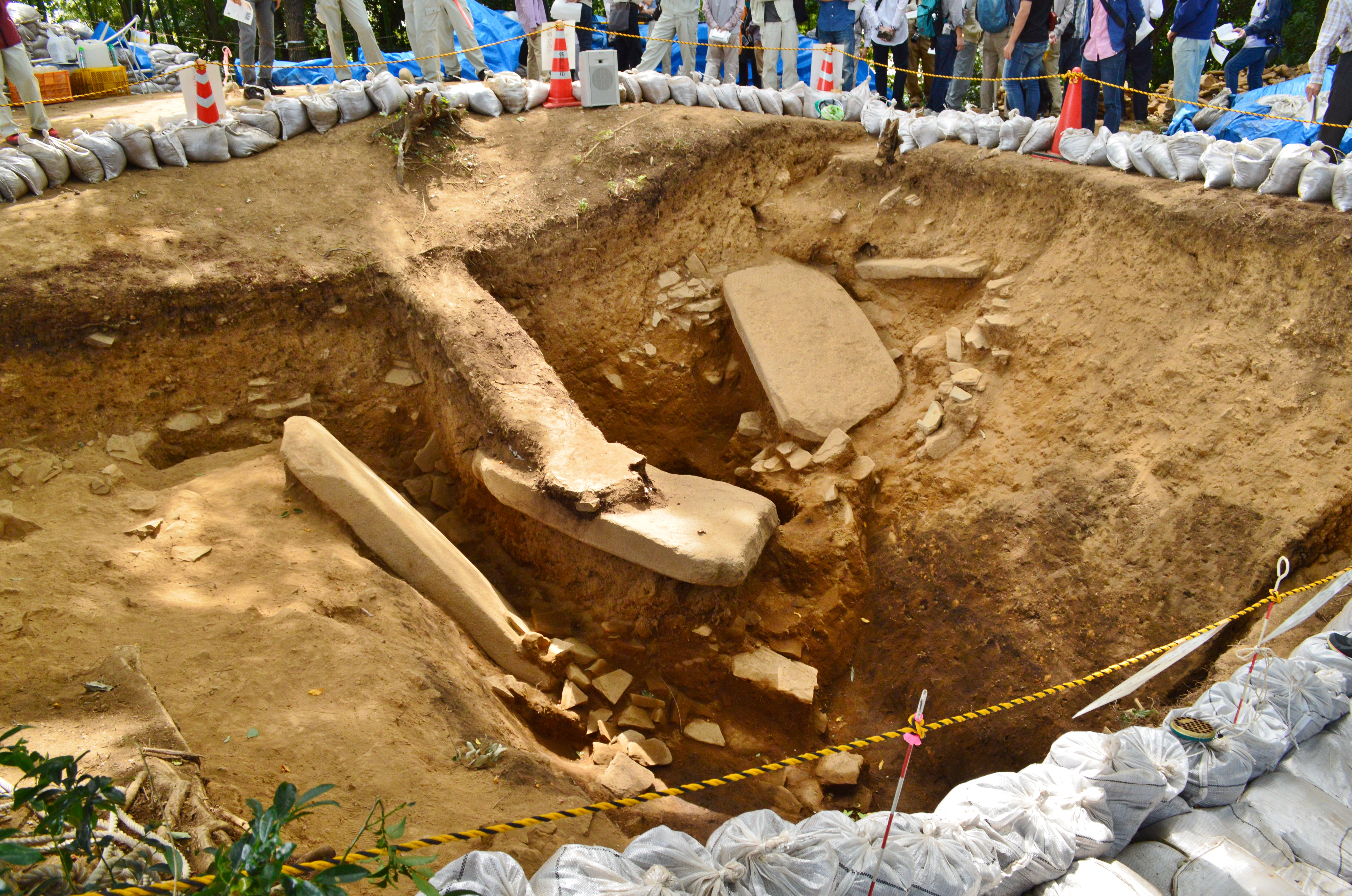 坊の塚古墳 竪穴式石槨 (2017年9月の発掘調査時)